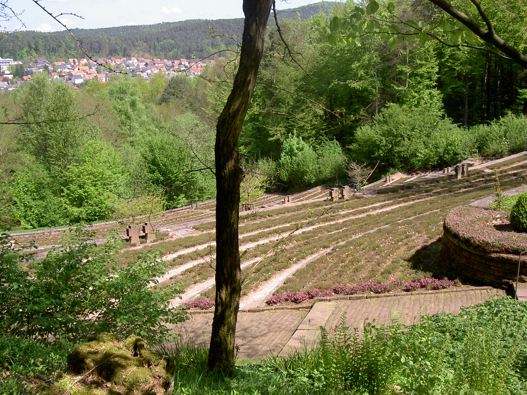 Soldatenfriedhof Dahn.